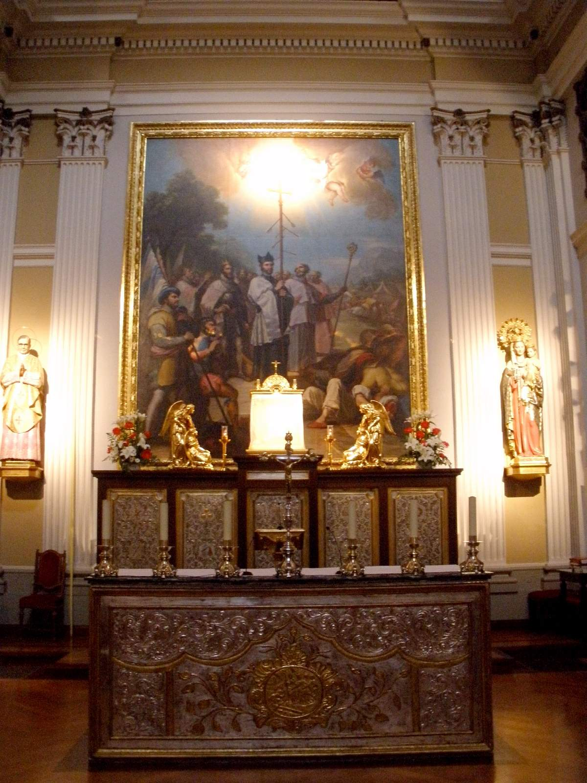 Iglesia de la Exaltación de la Santa Cruz (Zaragoza)